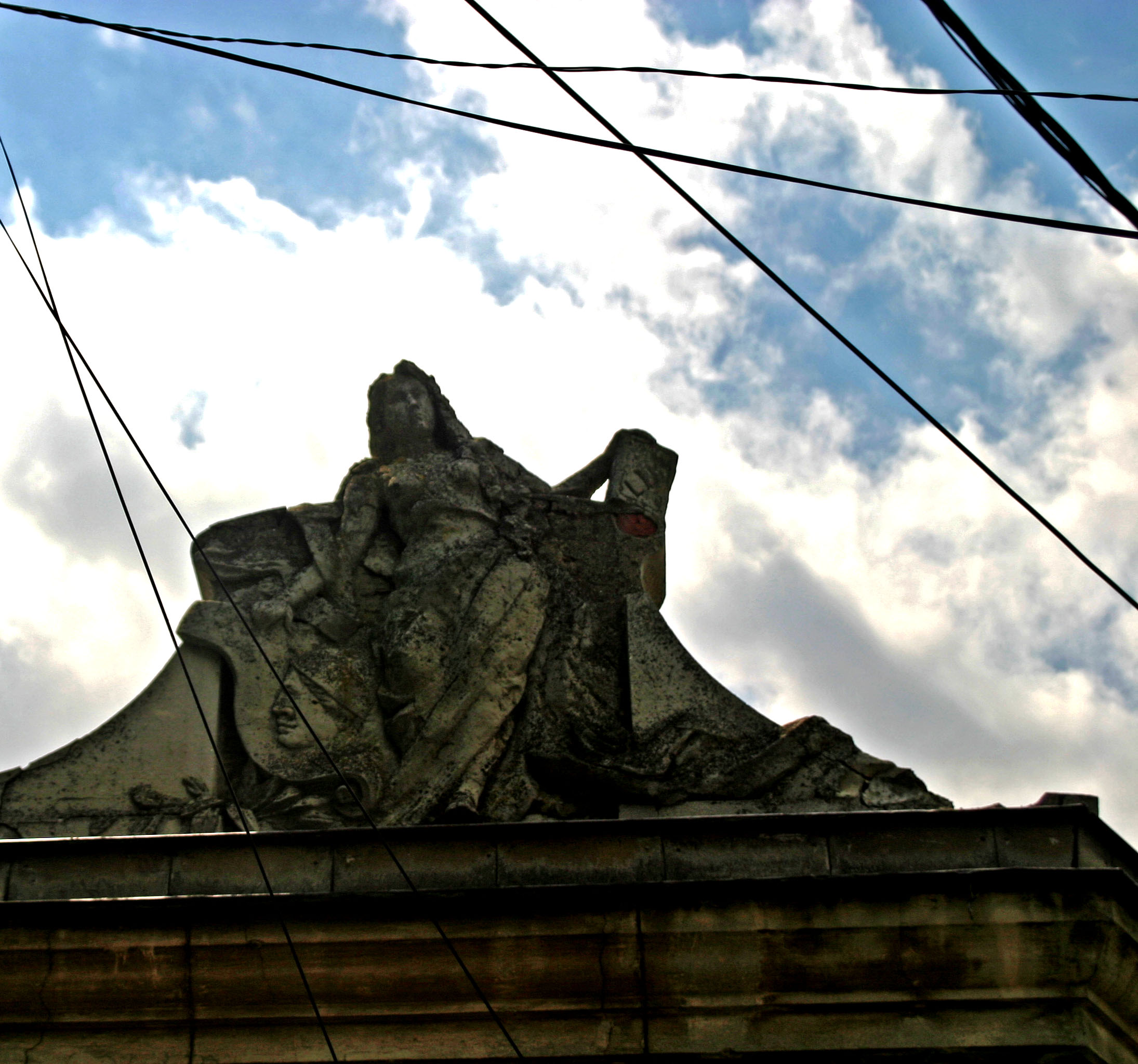 Casă Petru Rareș